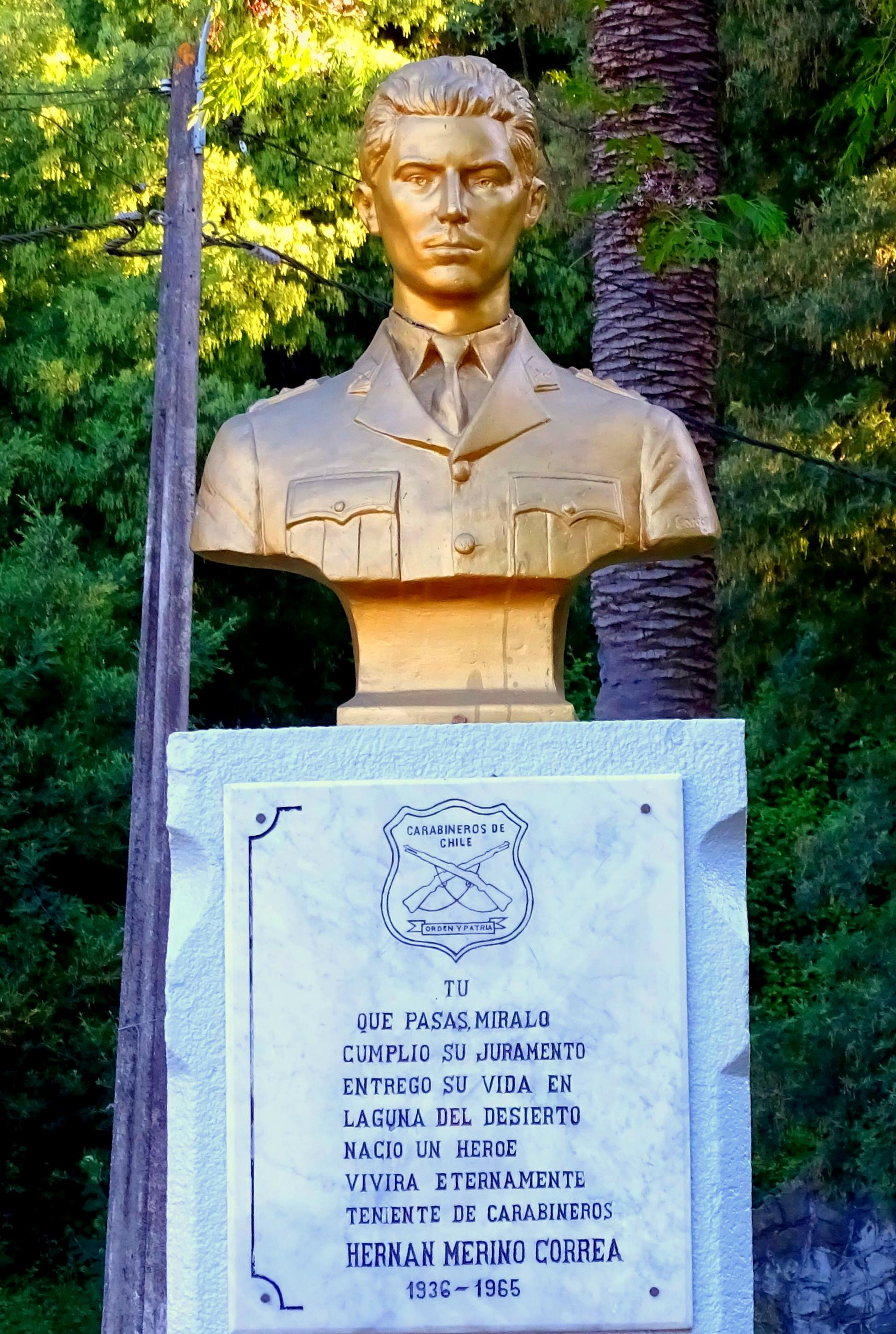 Busto de Hernán Merino en el parque ecuador de concepción, VIII Región del Bío-Bío, Chile.